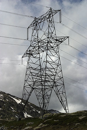 Strommast auf dem Gotthard